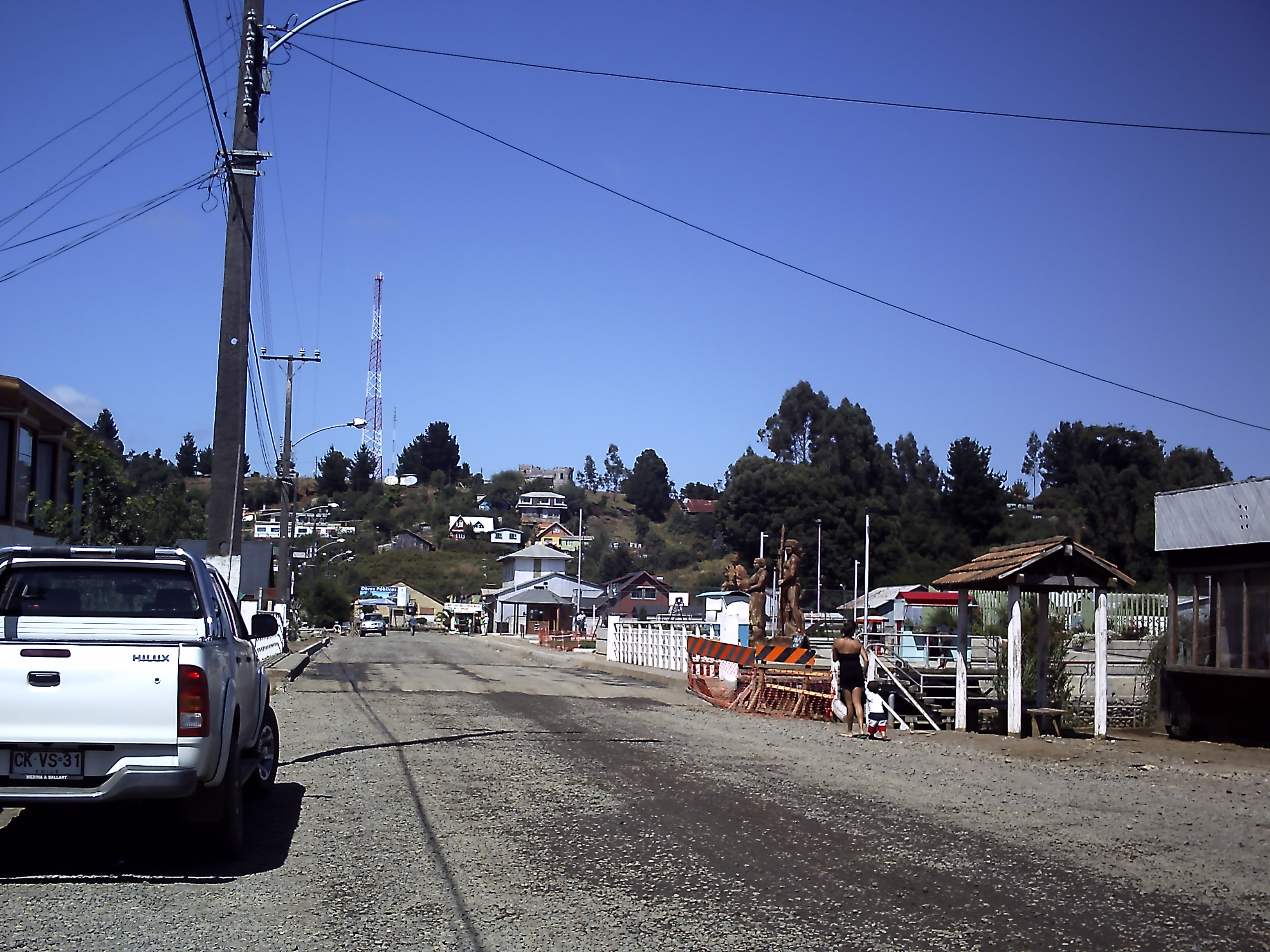 Entrada a Puerto Domínguez desde Carahue